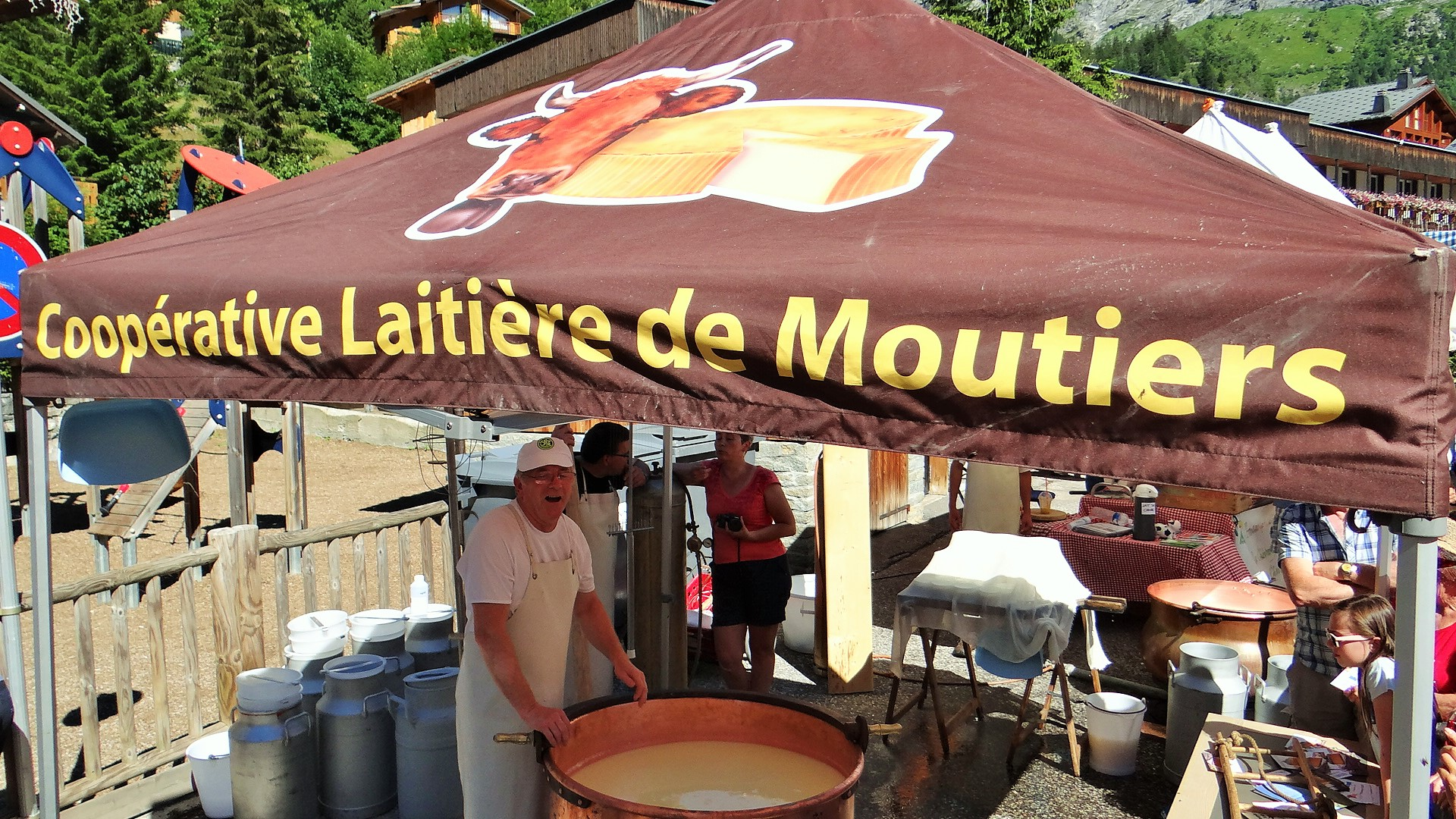 Fabrication traditionnelle du Beaufort par la Coopérative Laitière de Moutiers lors de la fête de l’Alpe et des Guides de Pralognan-la-Vanoise, 17 juillet 2016 ː cuisson